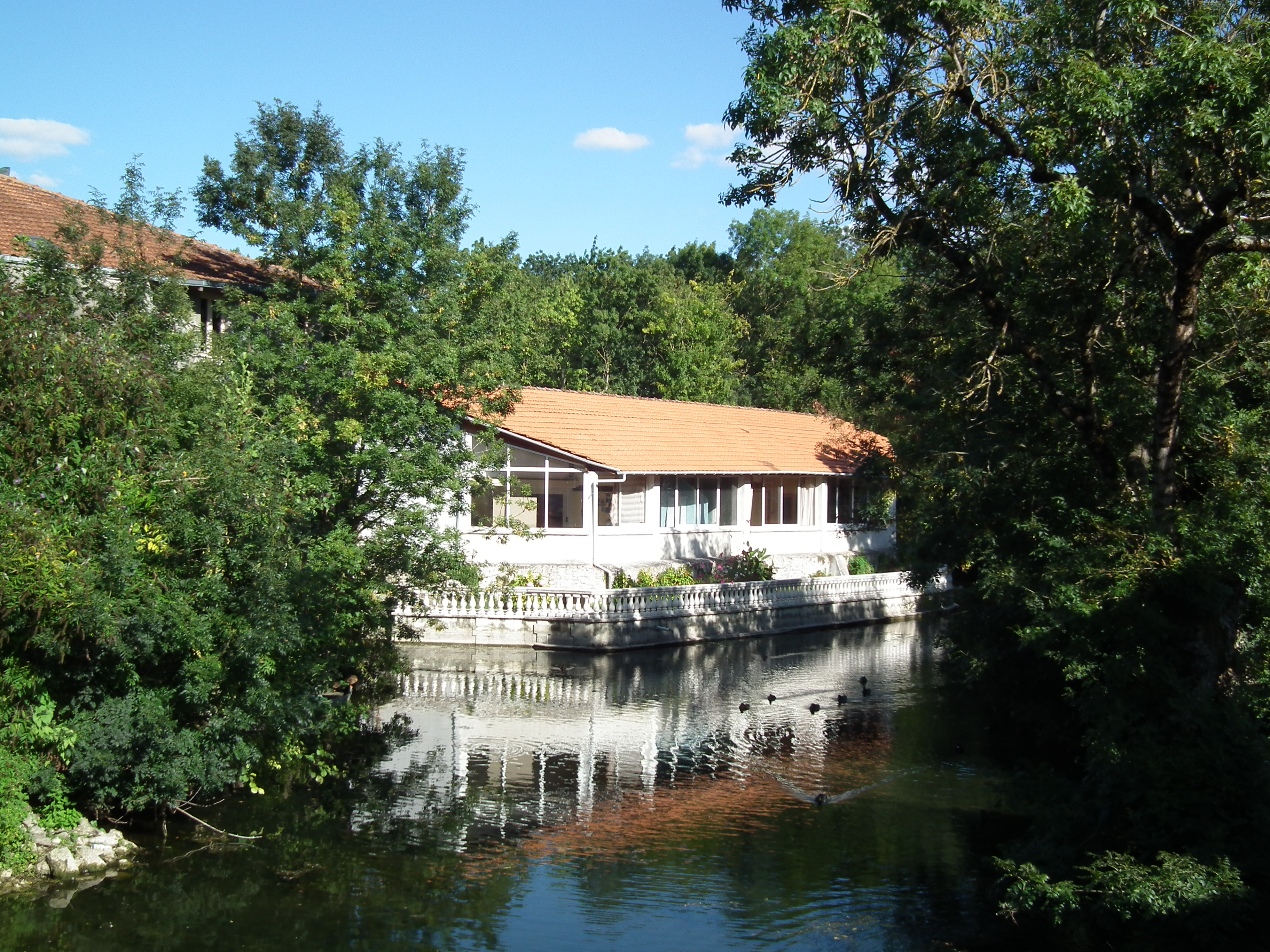 La Seugne à Pons, bâtiment du centre social dans l'ancien moulin.